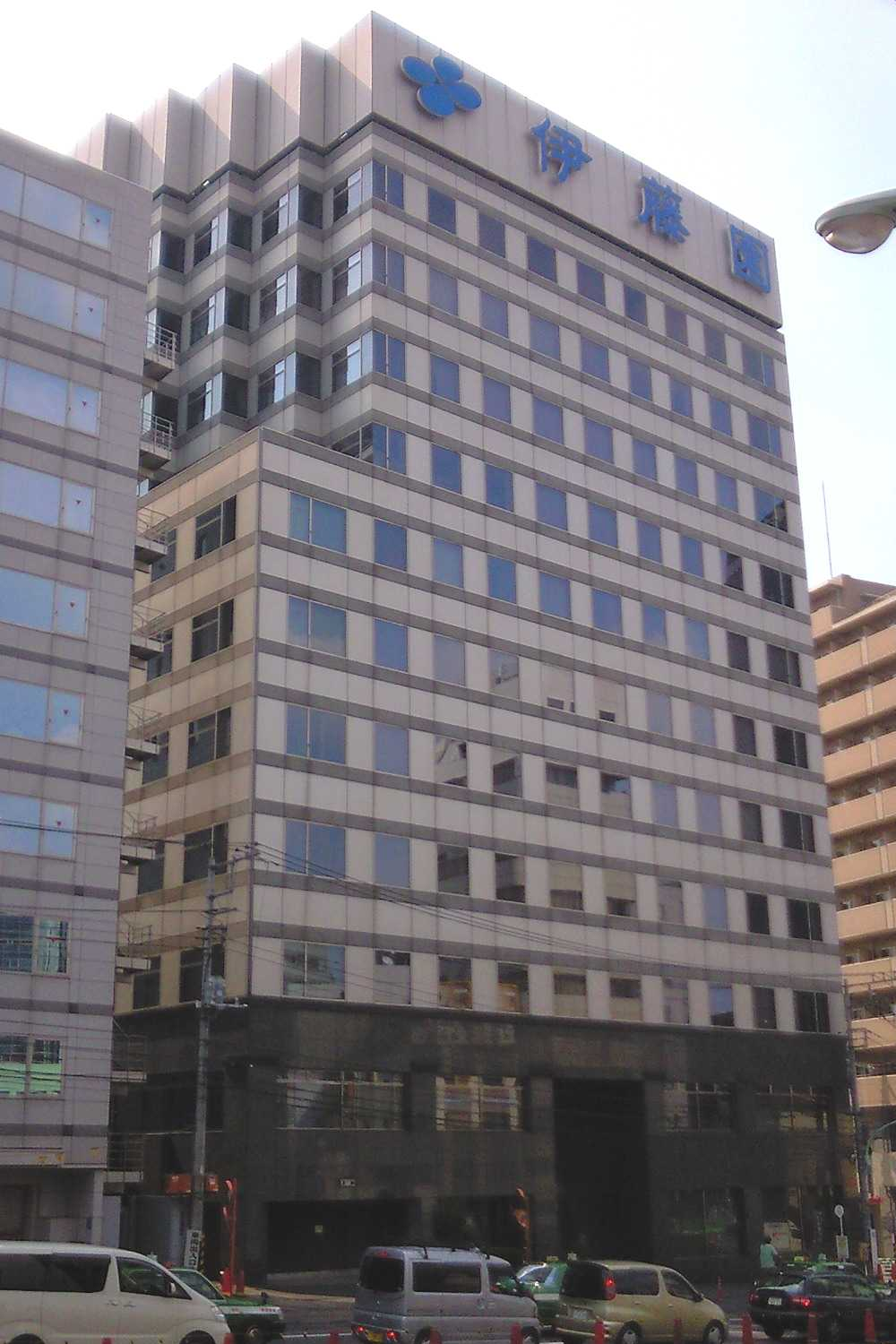 伊藤園本社ビル